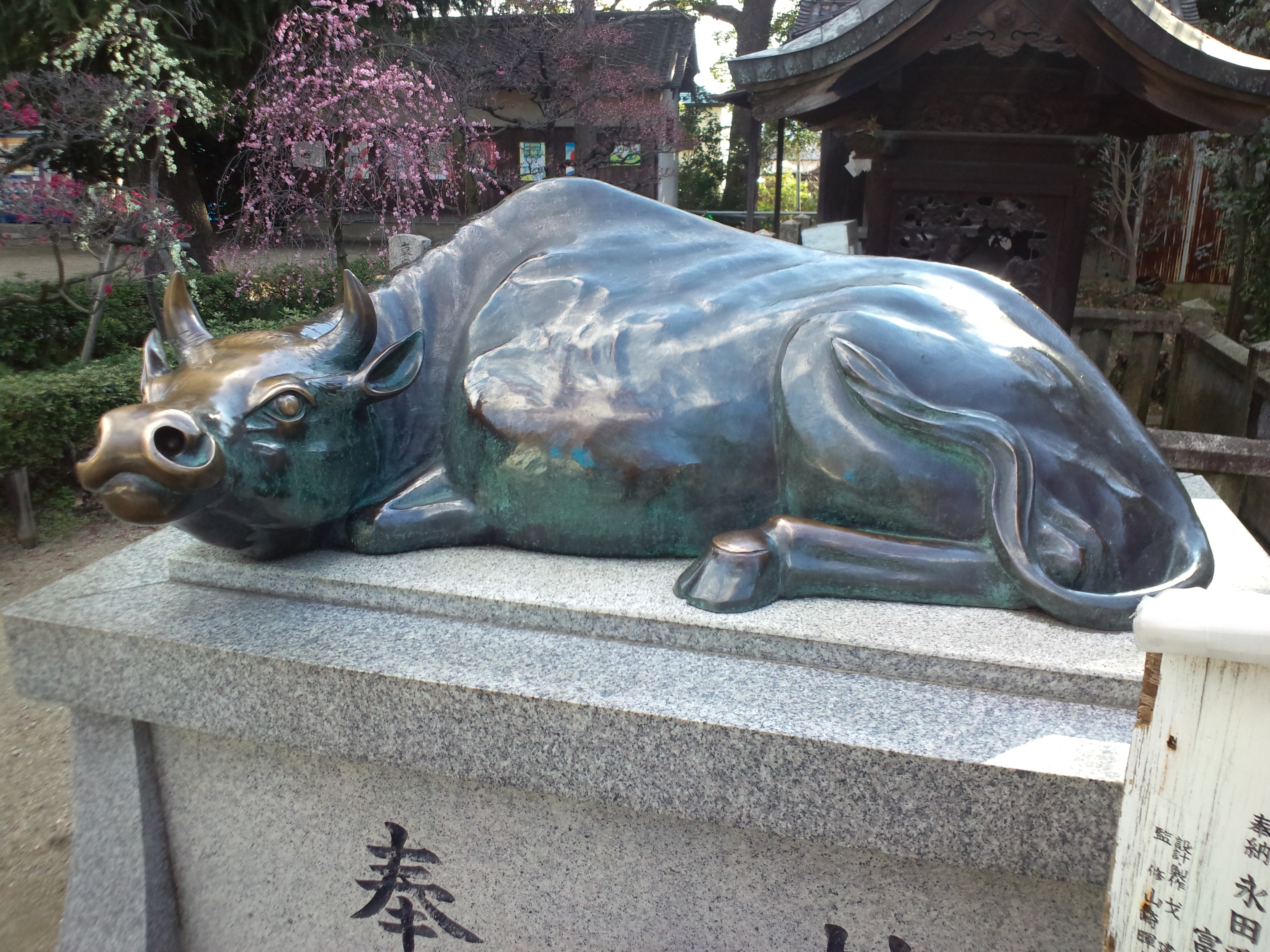 道明寺天満宮 臥牛像（撫で牛）